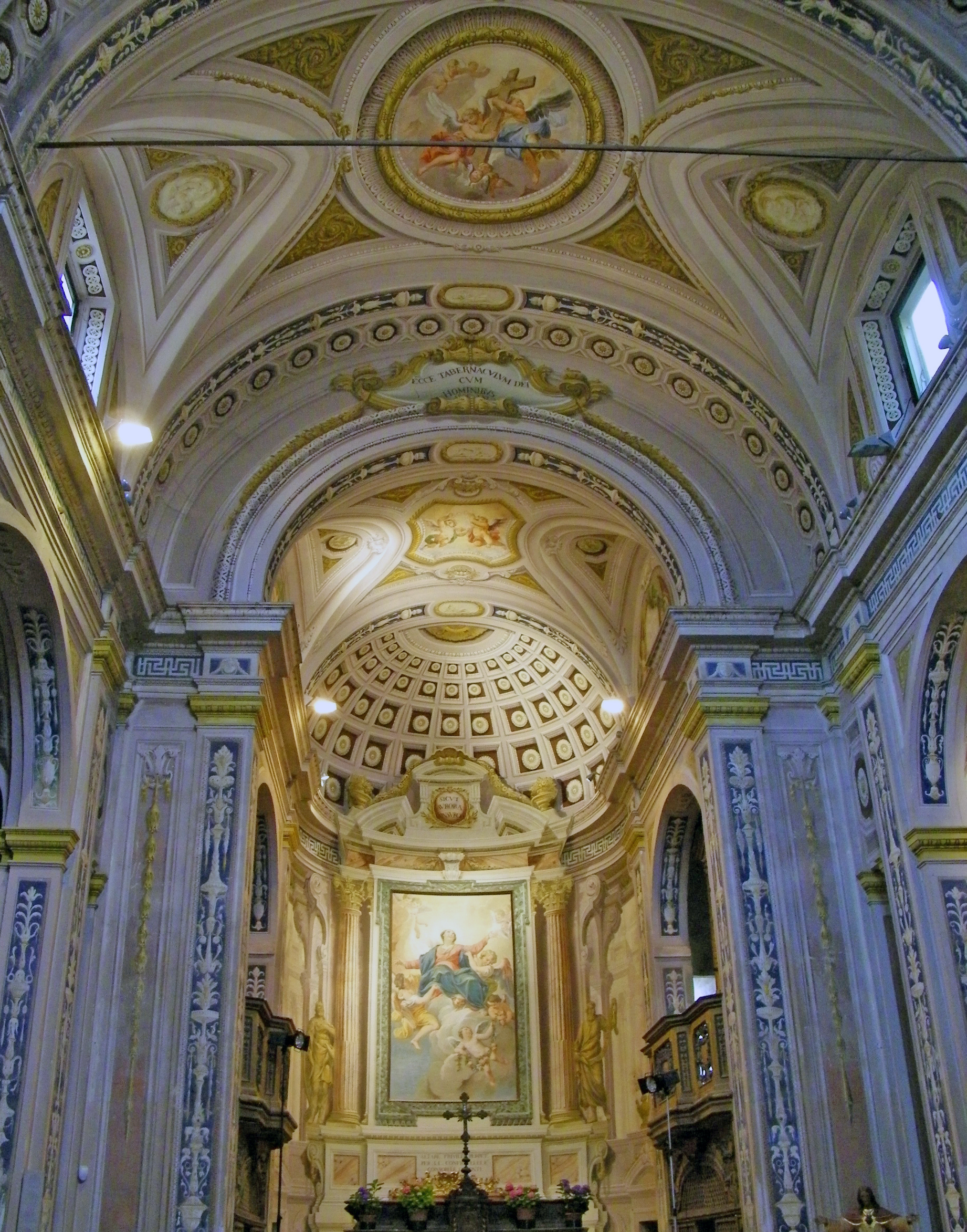 Oratorio di Santa Maria Assunta (Fontanellato) (interno)